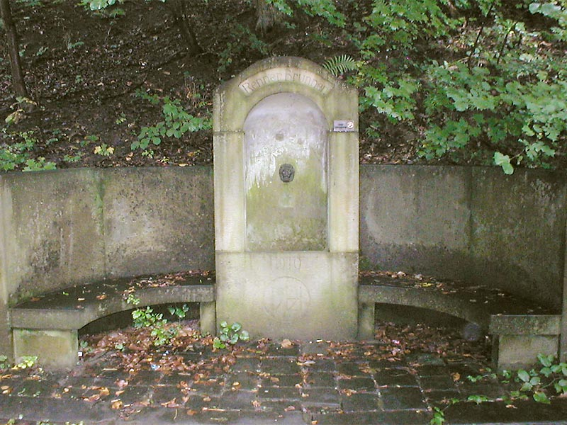 Rennerbrunnen beim Jägerhaus in Heilbronn. Der Brunnen geht auf das Molkenbrönnlein aus dem 18. Jahrhundert zurück und ist heute nicht mehr in Betrieb.